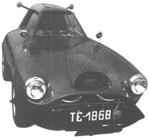 Mikrosamochód skonstruowany w 1966 roku przez inż. Stanisława Łukaszewicza, ówczesnego szefa Biura Konstrukcji Nadwozi DGK FSO, w celu posiadania ekonomicznego środka dojazdu do pracy.